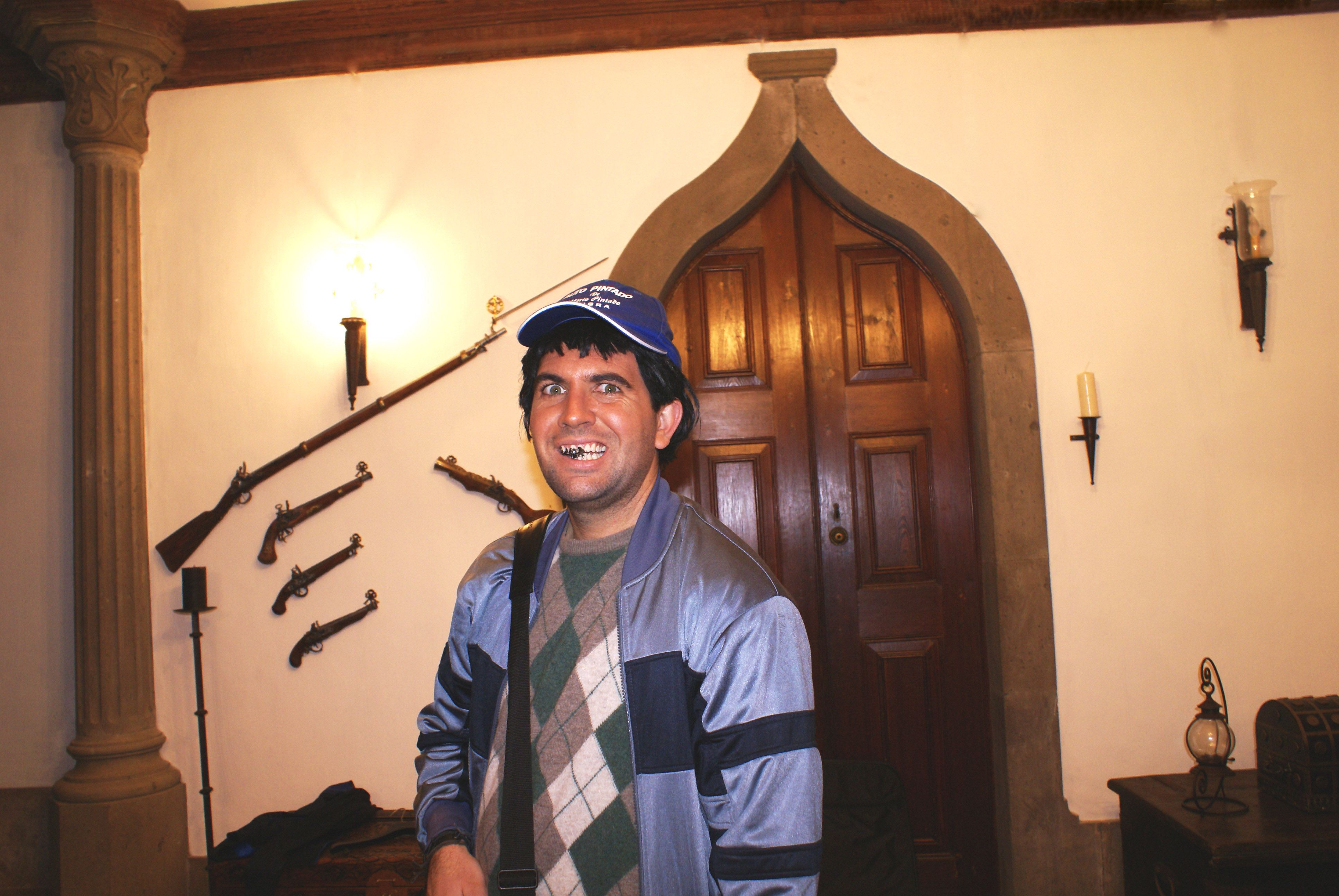 Fala Quem Sabe, episódio A casa assombrada, Filmado na Villa Maria